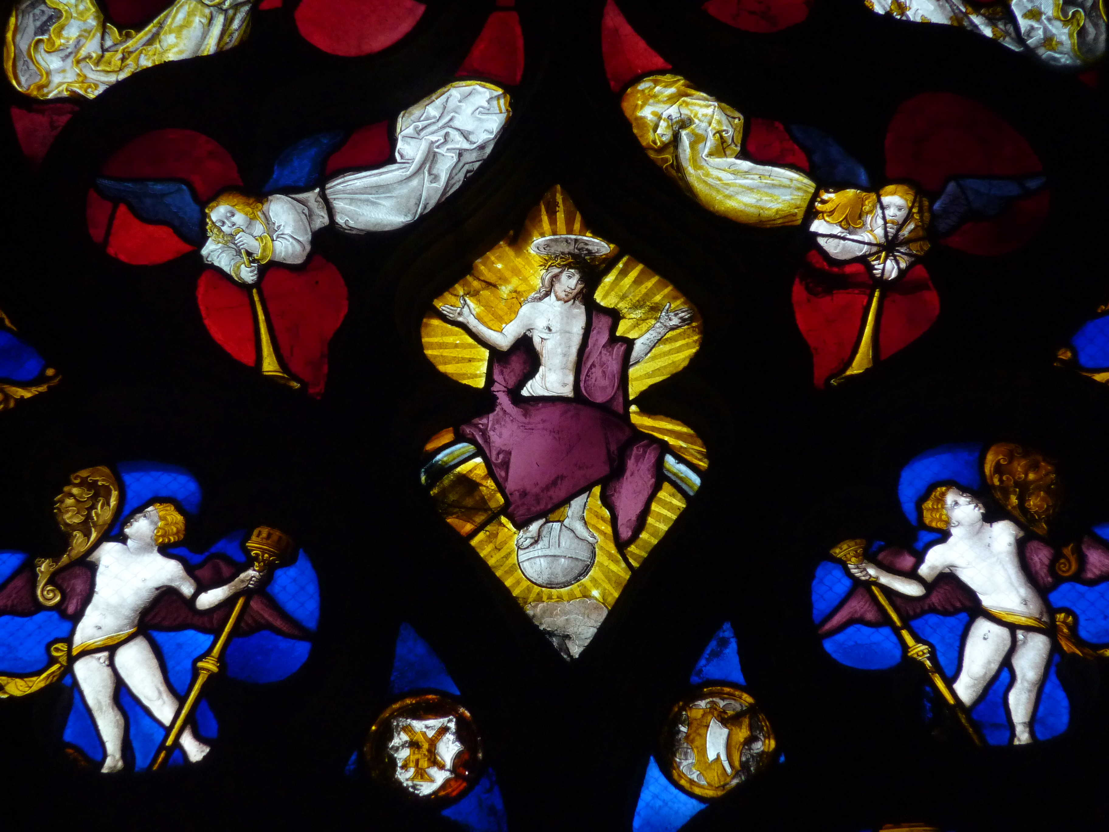 Bleiglasfenster (Baie 21) in der Stiftskirche Notre-Dame-en-Vaux in Châlons-en-Champagne im Département Marne (Champagne-Ardenne/Frankreich), um 1525 von den Küfern gestiftet; Darstellung: Geburt Christi; Ausschnitt Maßwerk: Majestas Domini und Werkzeuge der Küfer